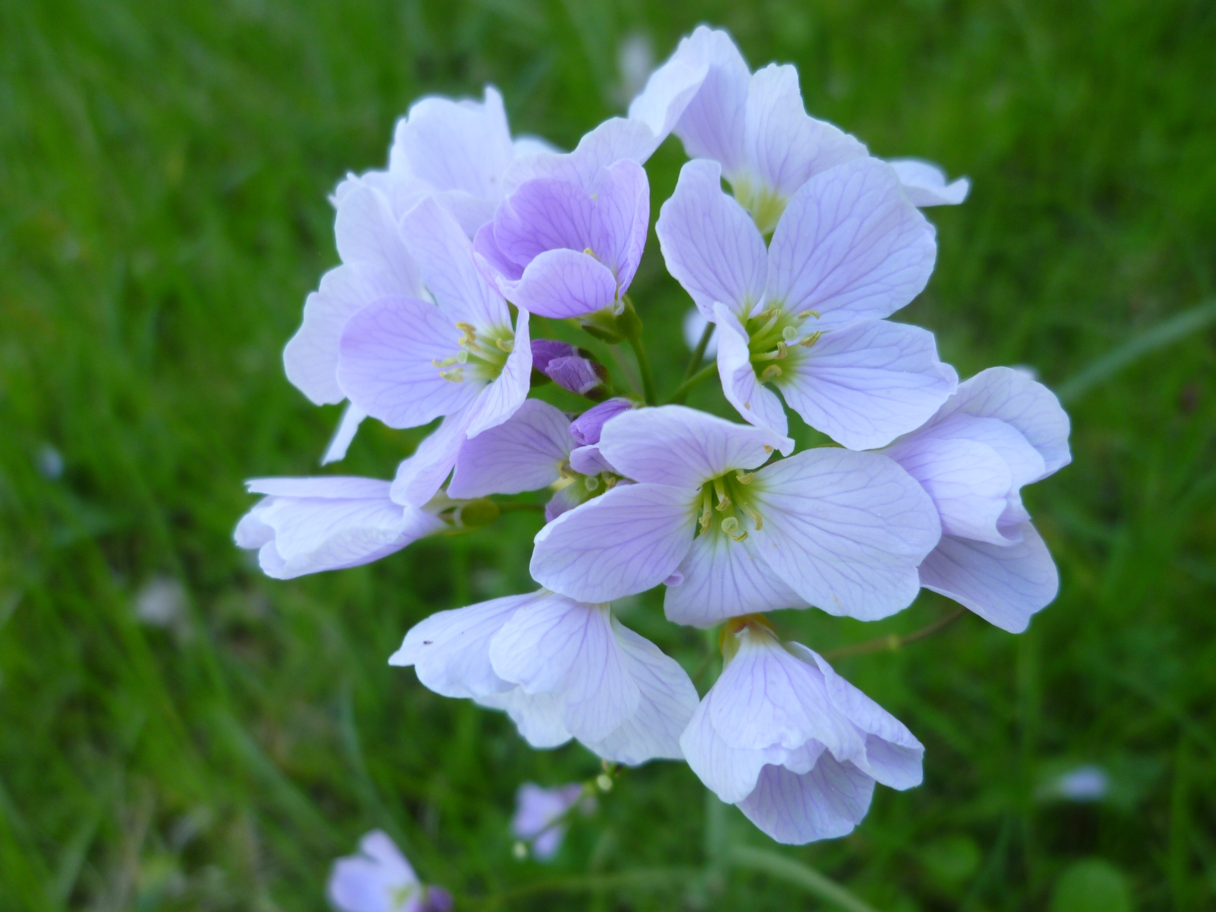 Blühendes Wiesenschaumkraut auf einer Wiese am Bogenberg.